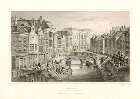 De Oude Gracht met Bezembrug en het stadhuis in Utrecht, omstreeks 1850